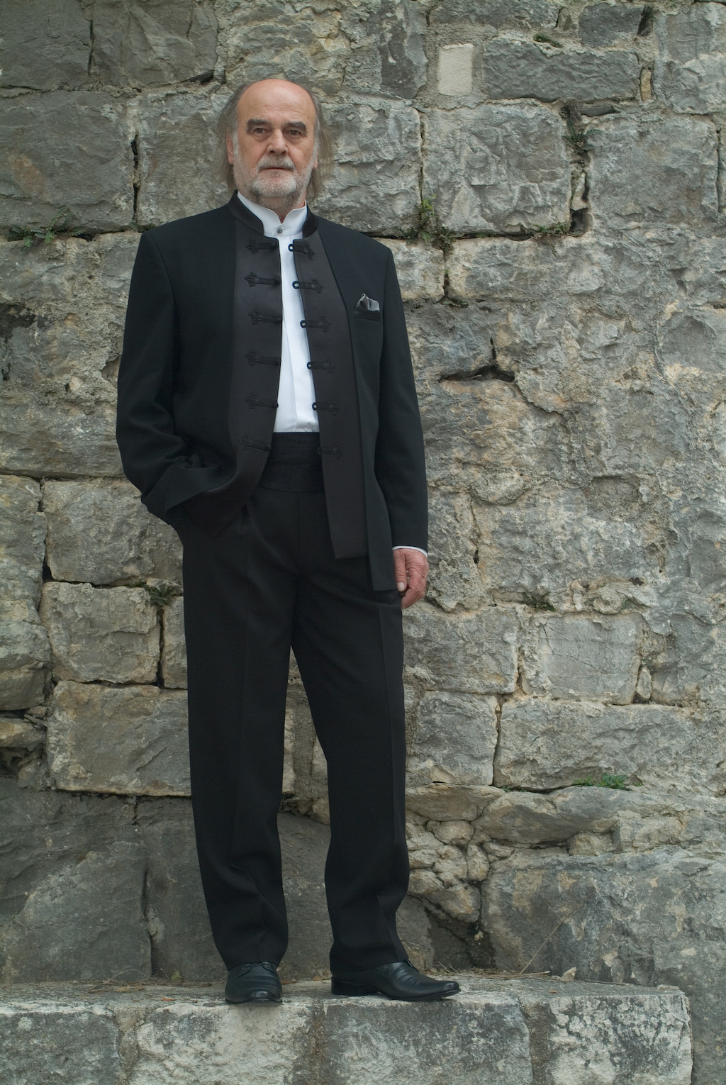 Obnovljeni dalmatinski veštit iz krojačnice Gena u Trogiru.